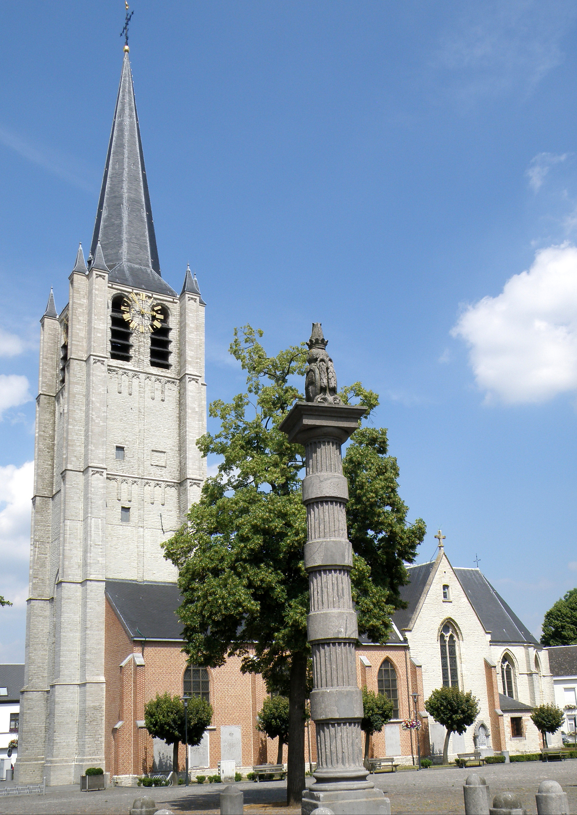 Wommelgem (prov. Antwerpen, België). Sint-Pieters- en Pauluskerk.